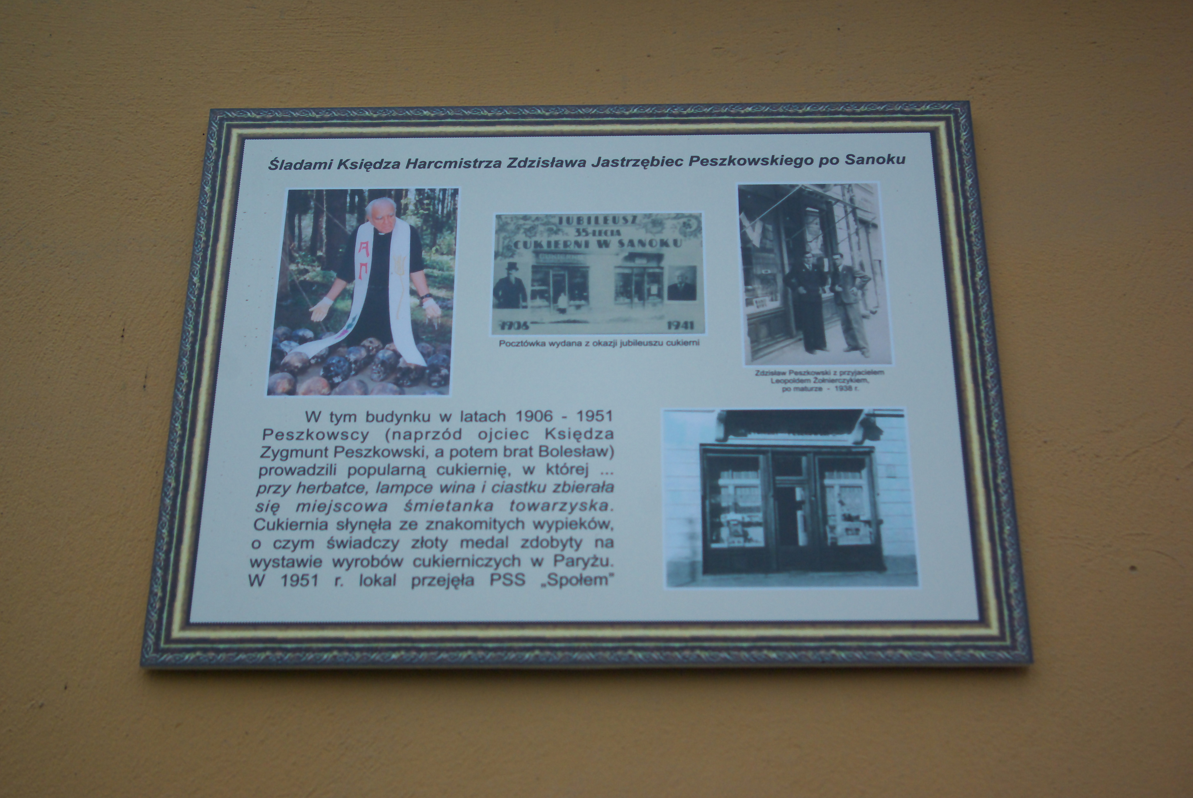 Kamienica przy ulicy Jagiellońskiej 10 w Sanoku. Tablica pamiątkowa pamięci ks. Zdzisława Peszkowskiego, którego rodzice prowadzili w budynku kawiarnię